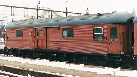 En äldre resgodsvagn i Malmö 1988